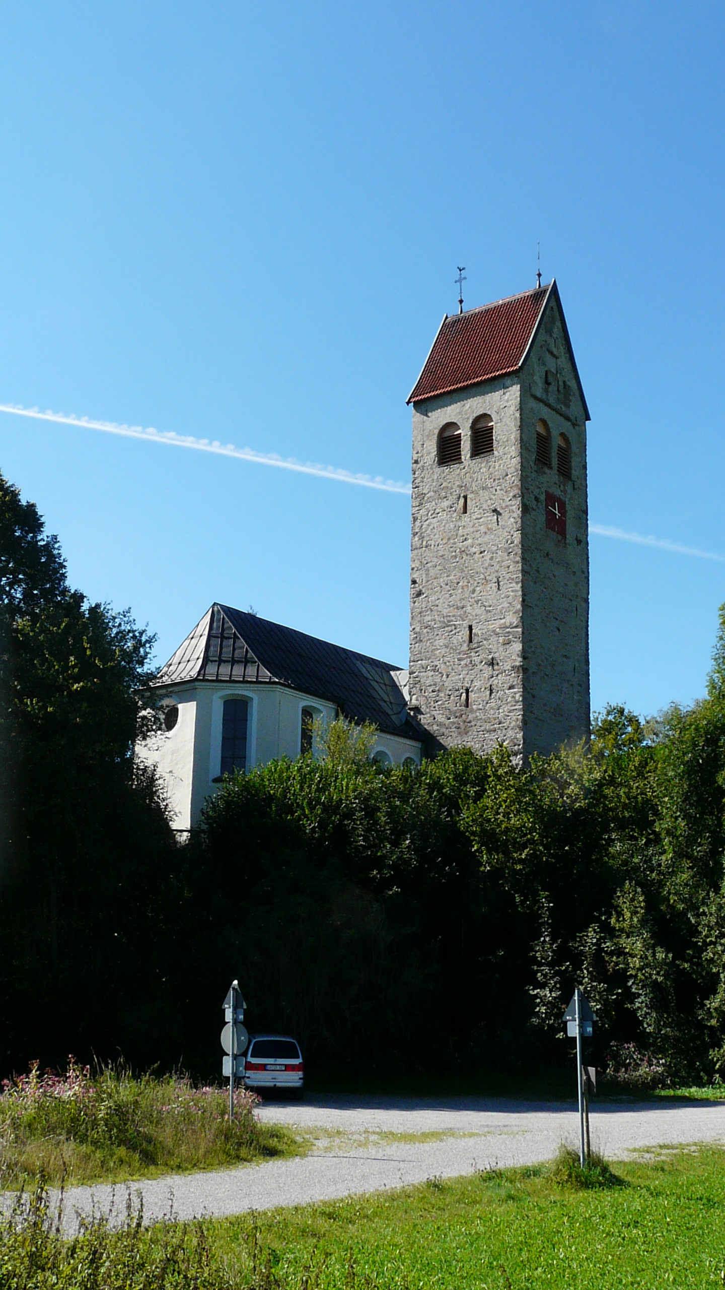 Kirche in Stein im Allgäu, Immenstadt im Allgäu